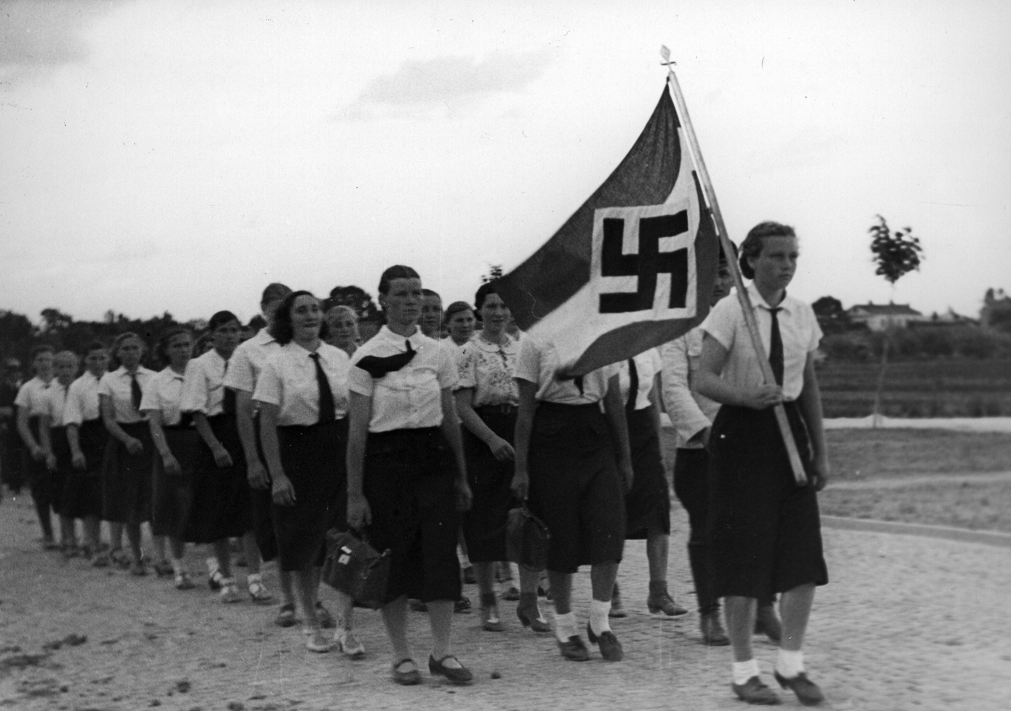 Dziewczęta - volksdeutsche ze Związku Dziewcząt Niemieckich (BDM) w drodze na majówkę. Kolumna dziewcząt z flagą ze swastyką w marszu na szosie